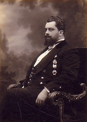 Константин Николаевич де Рошфор, петербургский архитетор эпохи модерн, собиратель русской старины, историк 1-го кадетского корпуса.